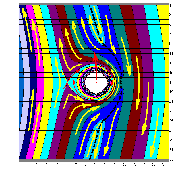 Hill sphere and Horseshoe_orbit